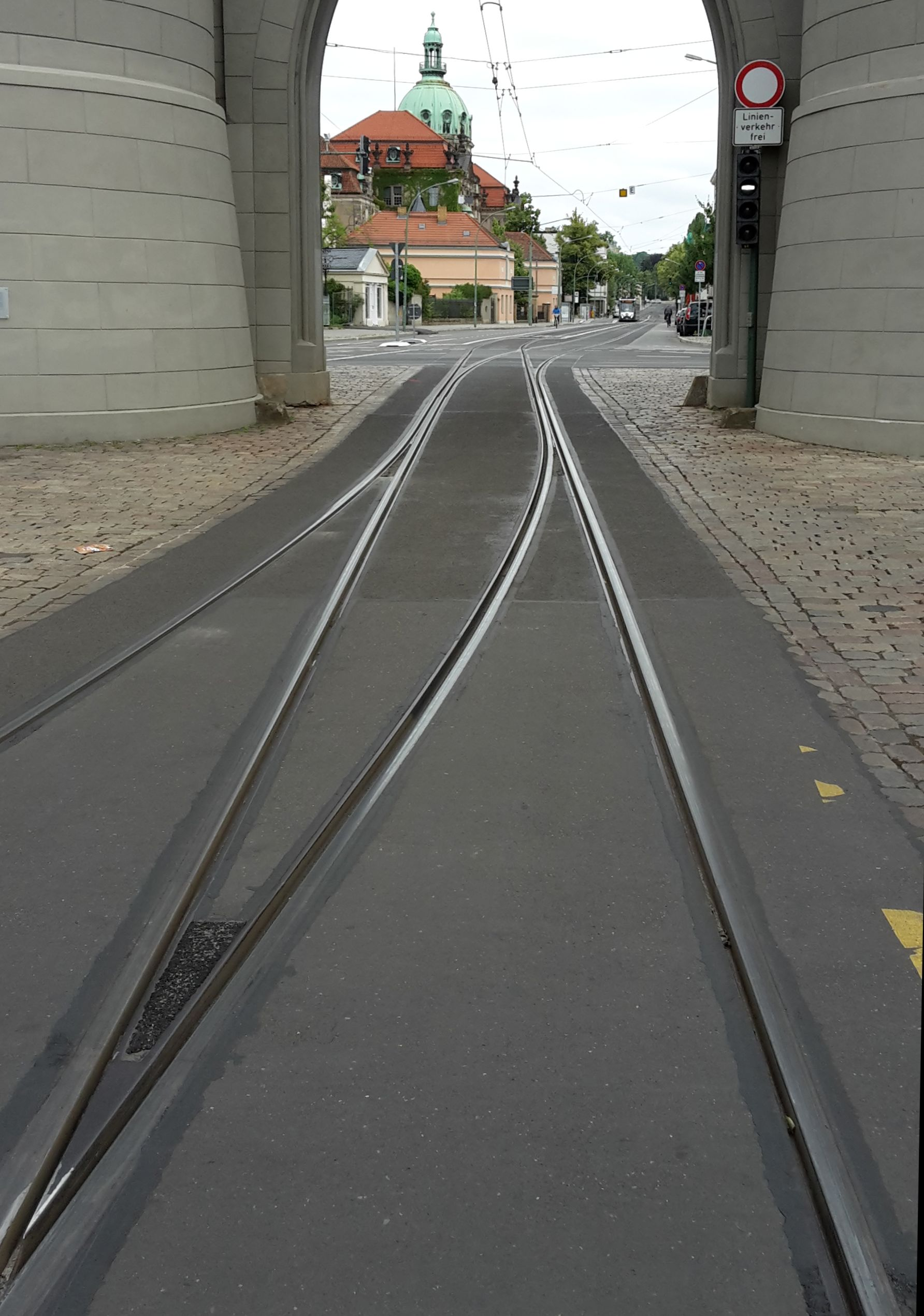 Nauener Tor in Potsdam: zwei ineinander verschobene Tram-Gleise (Gleisverschlingung)